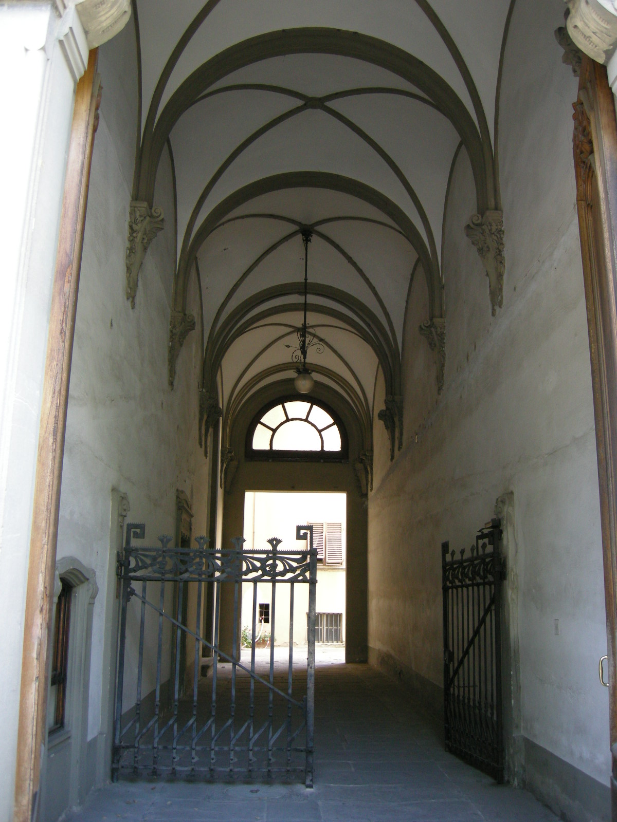 Villa uzielli 09 androne